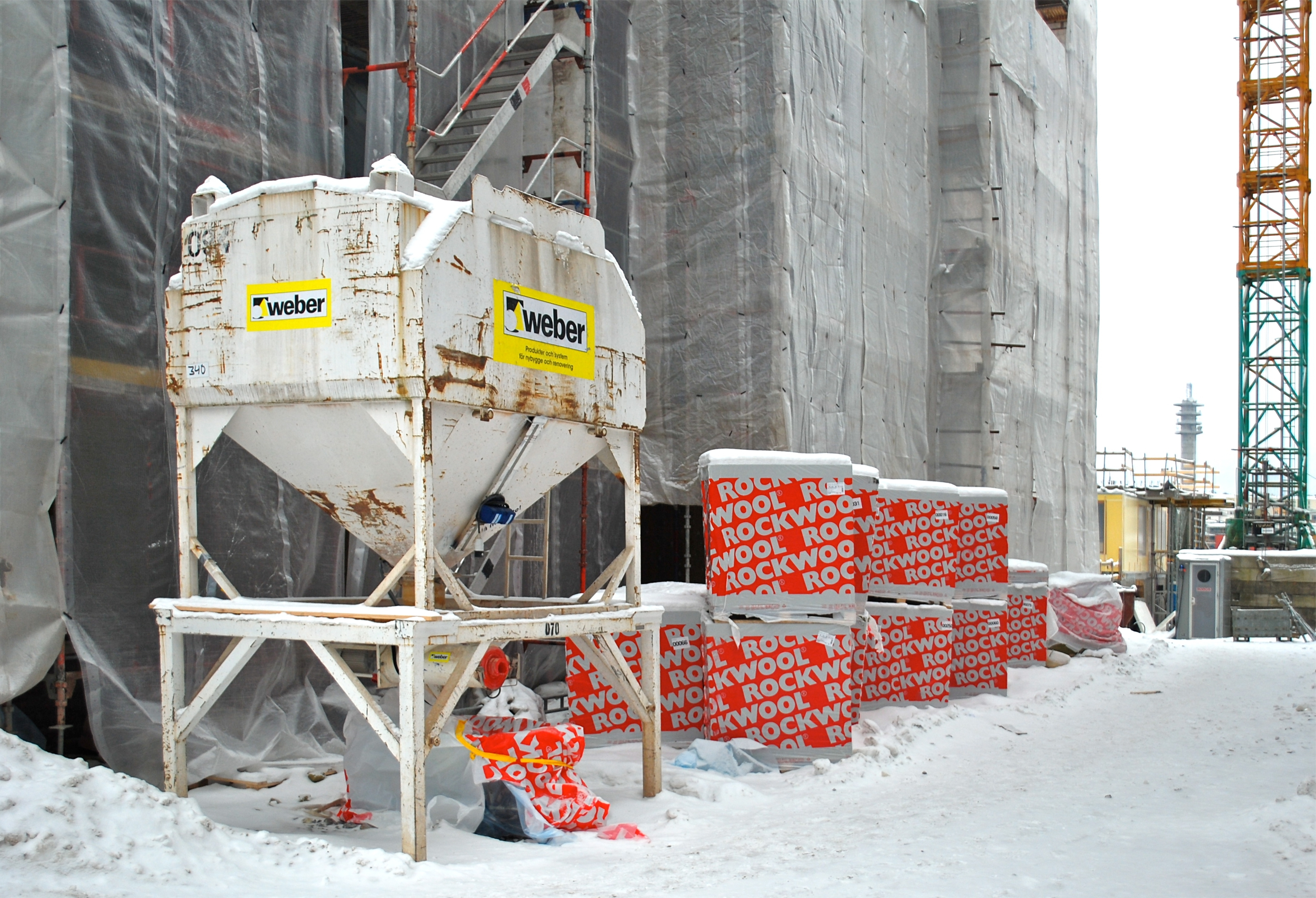 Maskinsystem med automatisk bruksblandning för betong.